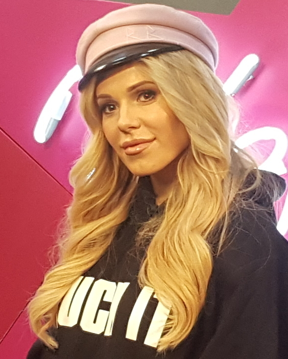 Polska piosenkarka Dorota "Doda" Rabczewska w 2018 roku.